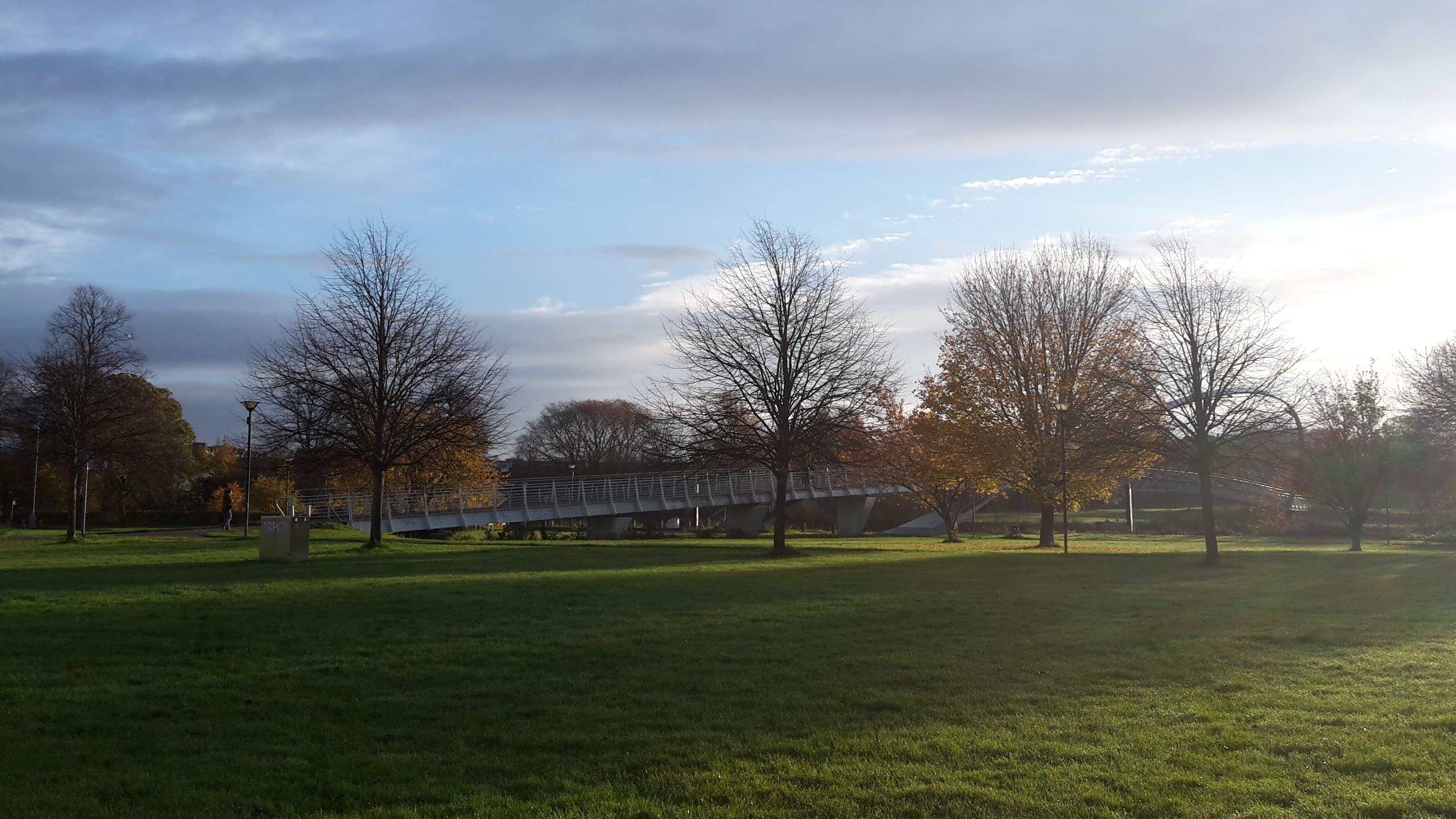 A view taken November 2017 before 9am